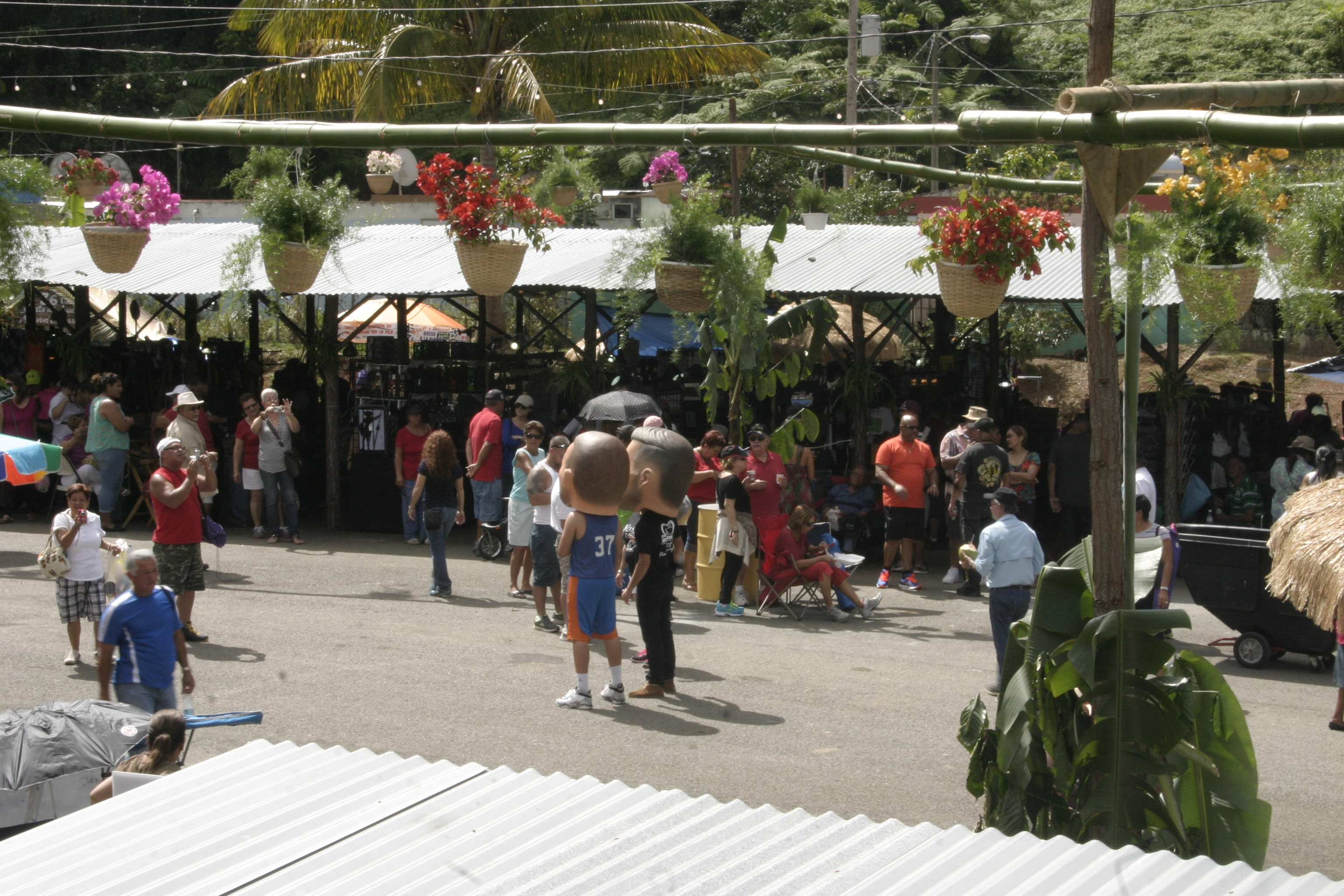 Fiesta del Acabe del Café en Maricao, Puerto Rico